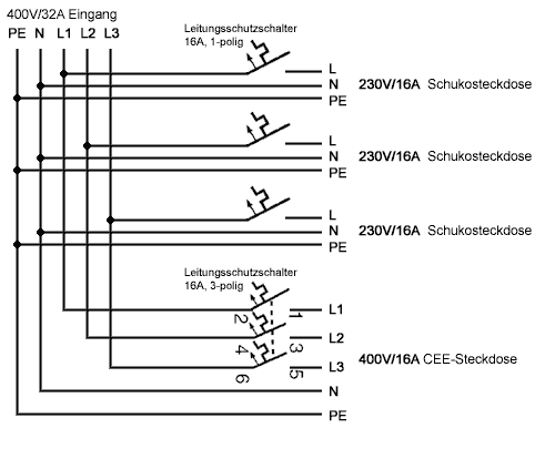 Schaltplan für einen CEE-Stromverteiler mit 32A CEE-Eingang, 3x Schukoausgang und 16A CEE-Ausgang. Wackernheim, den 25.08.2005